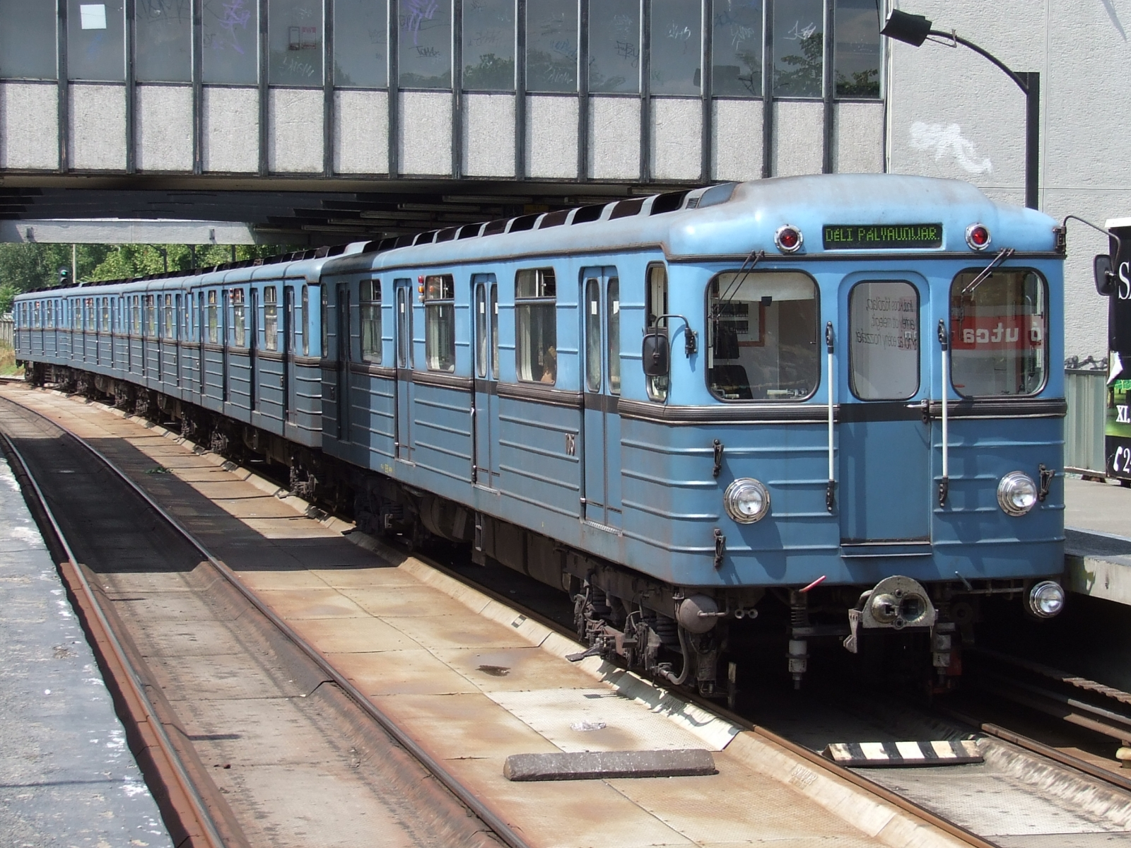 1970-ben forgalomba állított, 2002-ben korszerűsített EV típusú metrószerelvény (105-106-107-108-109 pályaszámú kocsik)a még felújítás előtt álló Pillangó utca állomáson.